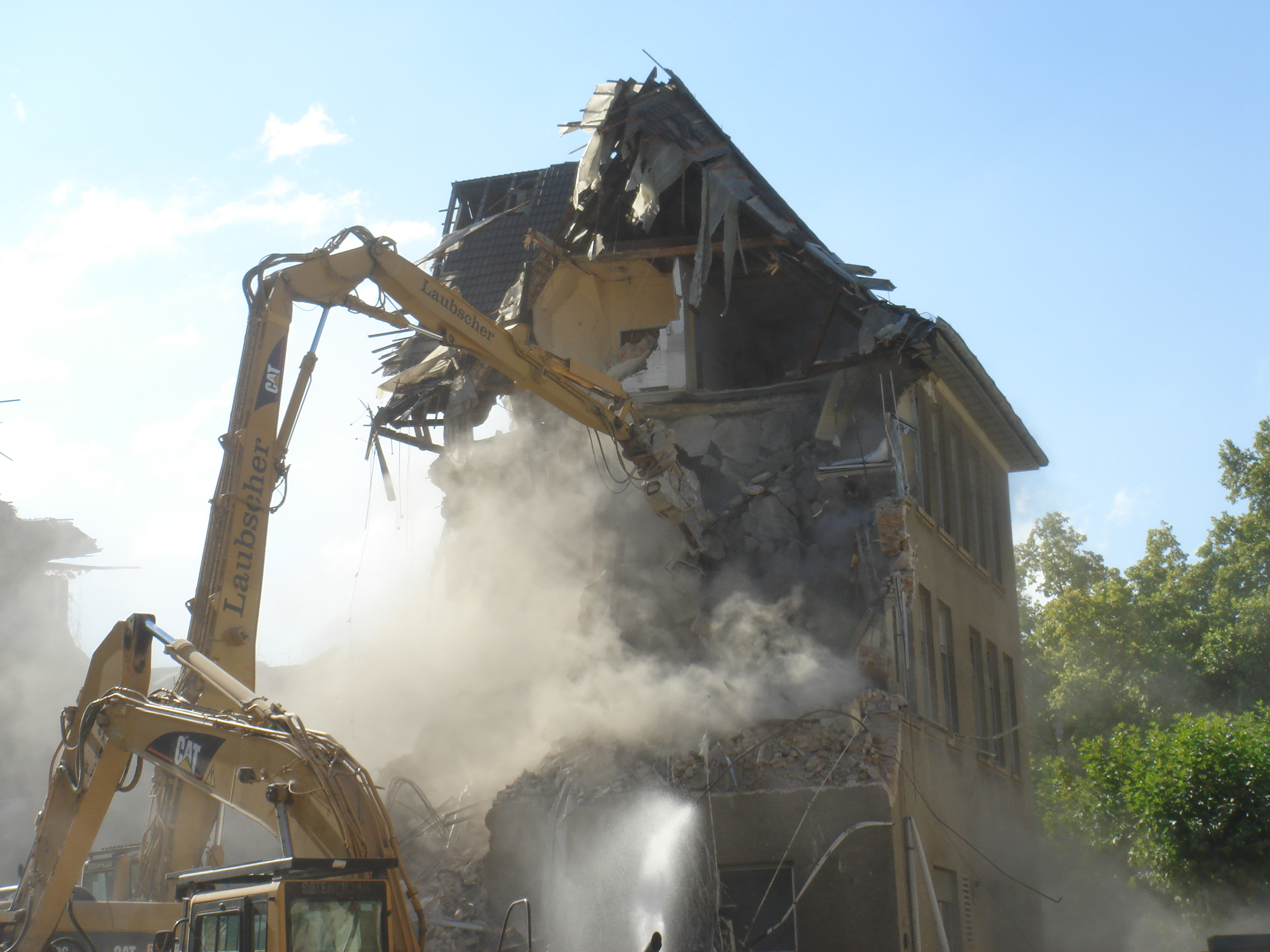 Abriss Bagger demolition Freiherr-vom-Stein-Schule (Frankfurt am Main)